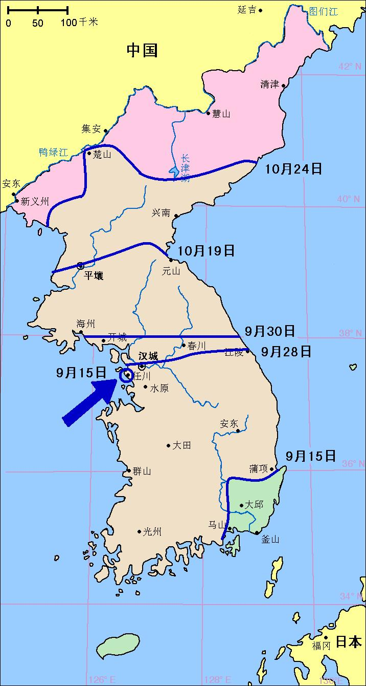 朝鲜战争第二阶段联合国军进攻形势地图